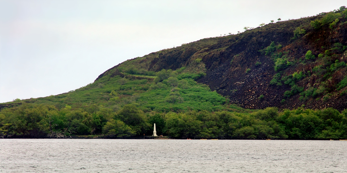 Иллюстрация для викиучебника Гавайеведение